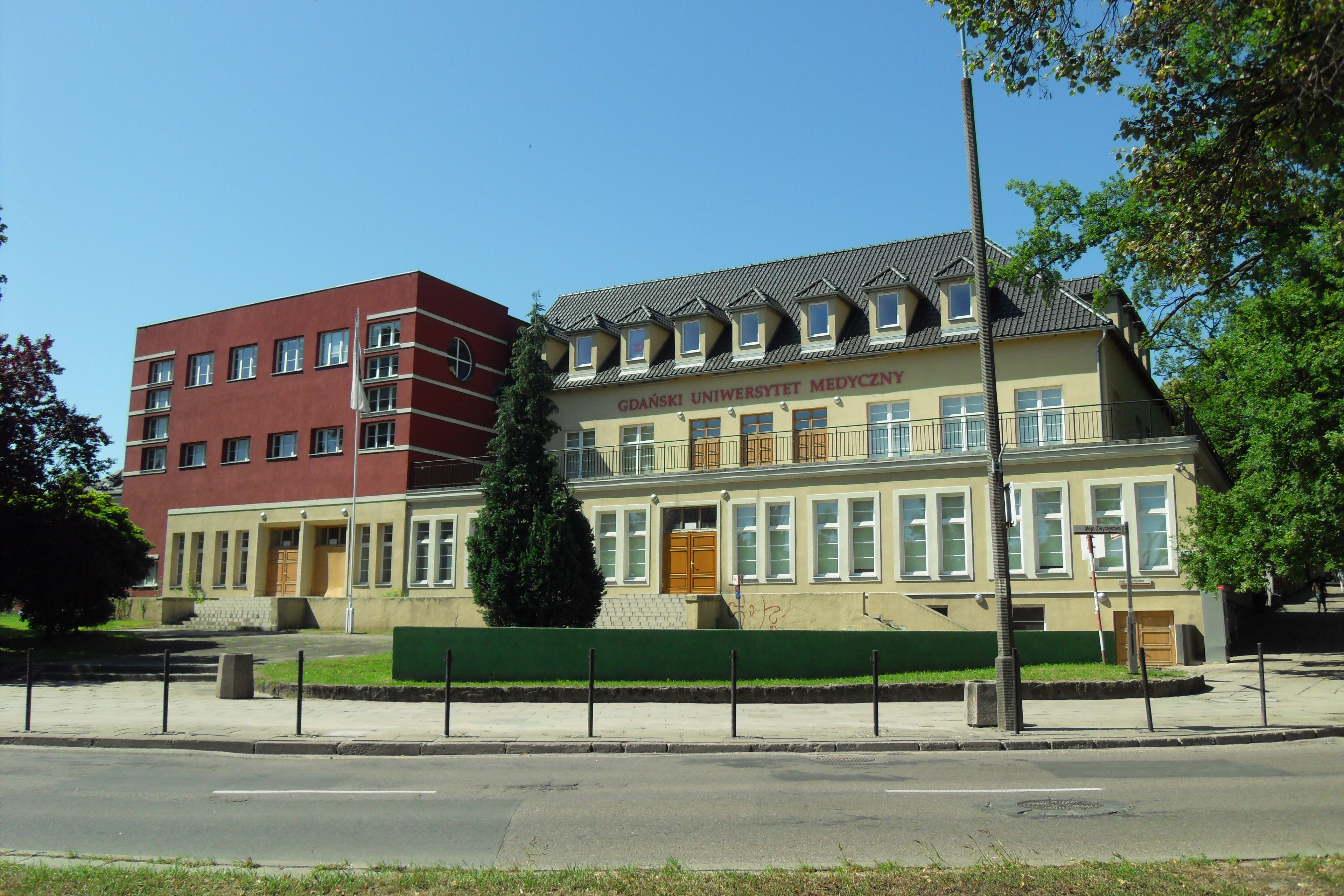 Gdański Uniwersytet Medyczny. Budynek Atheneum Gedanense Novum, al. Zwycięstwa 41/42 Gdańsk.